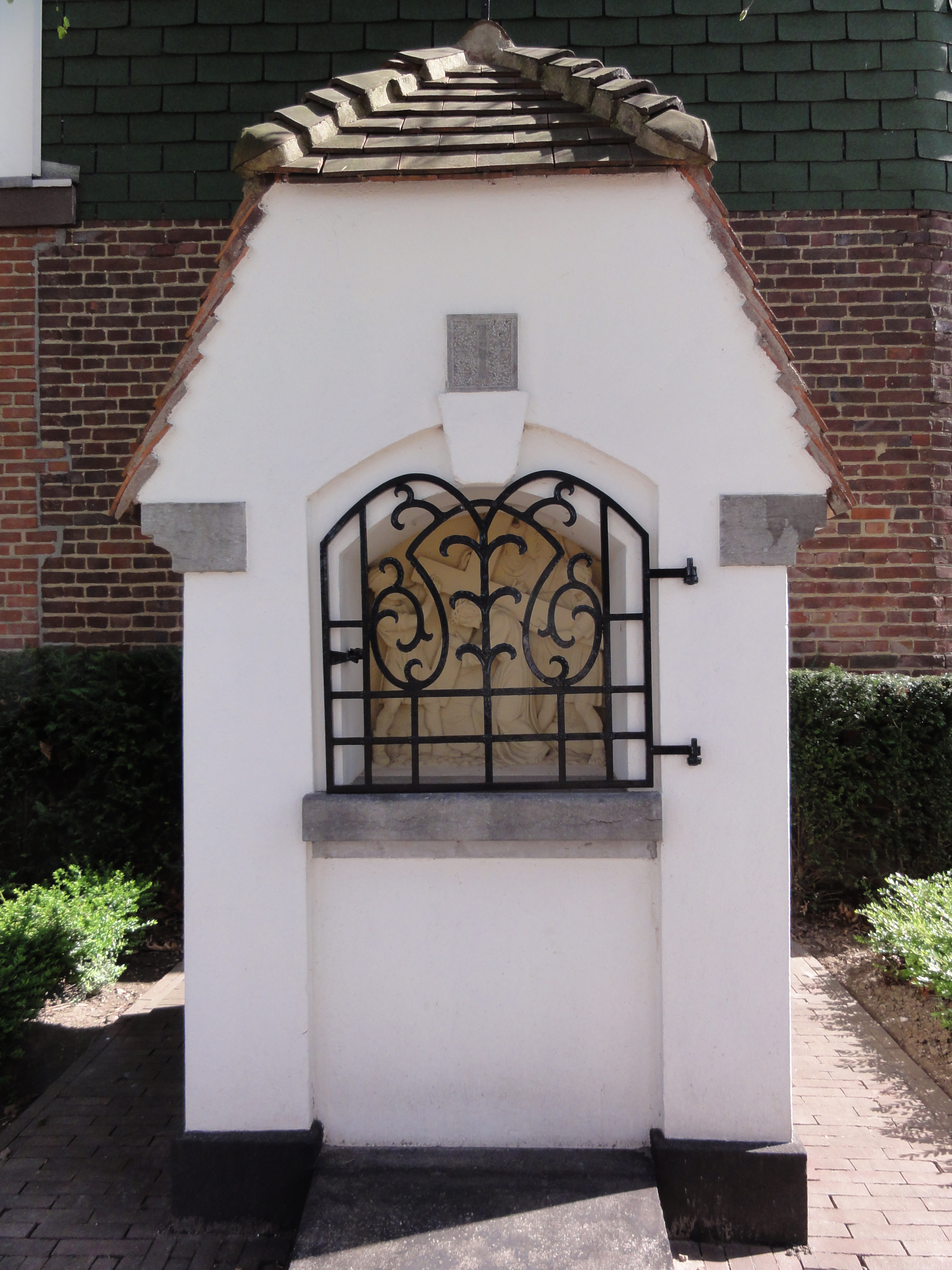 Echt (Limburg, NL) kruiswegstatie in kruiswegpark bij kapel O.L.Vrouw van Schilberg